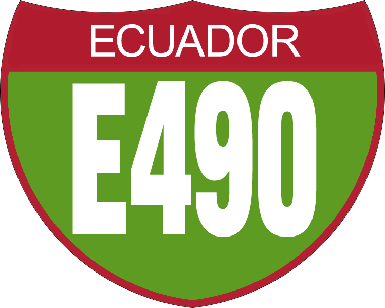 Disco de Identificación Ruta E490